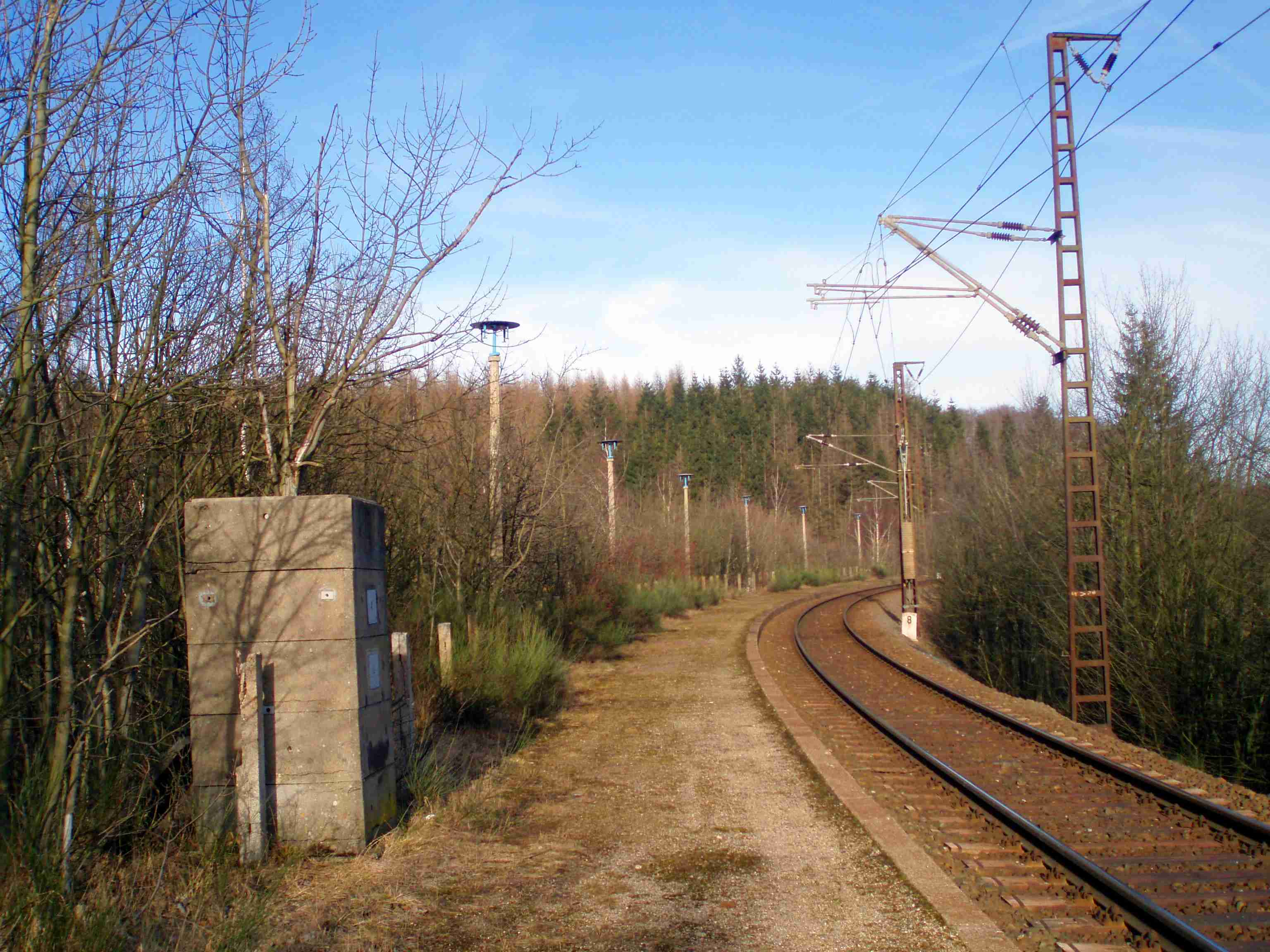 Ehemaliger Haltepunkt Braunesumpf